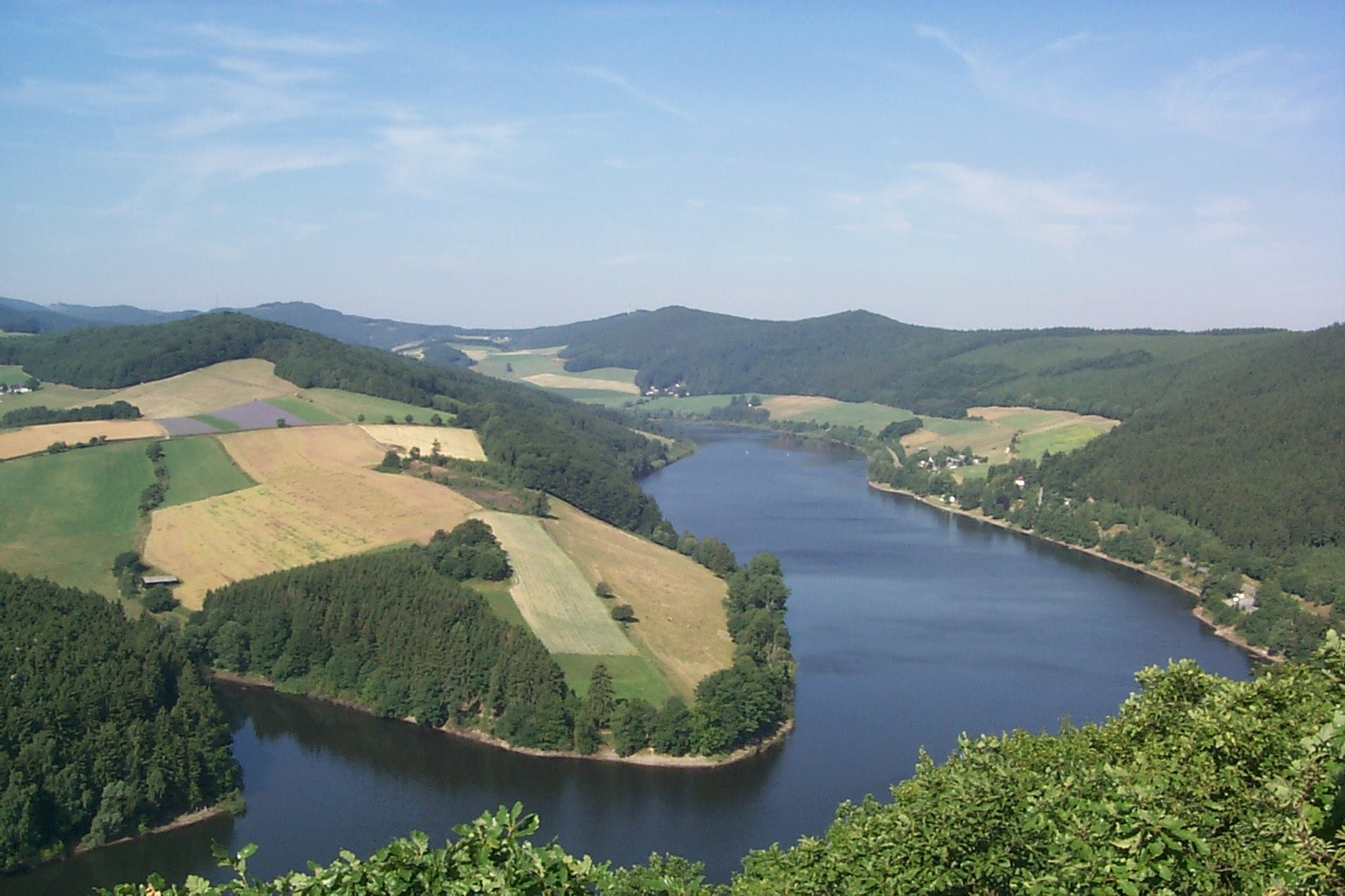 Diemelsee fotografiert vom St. Muffert